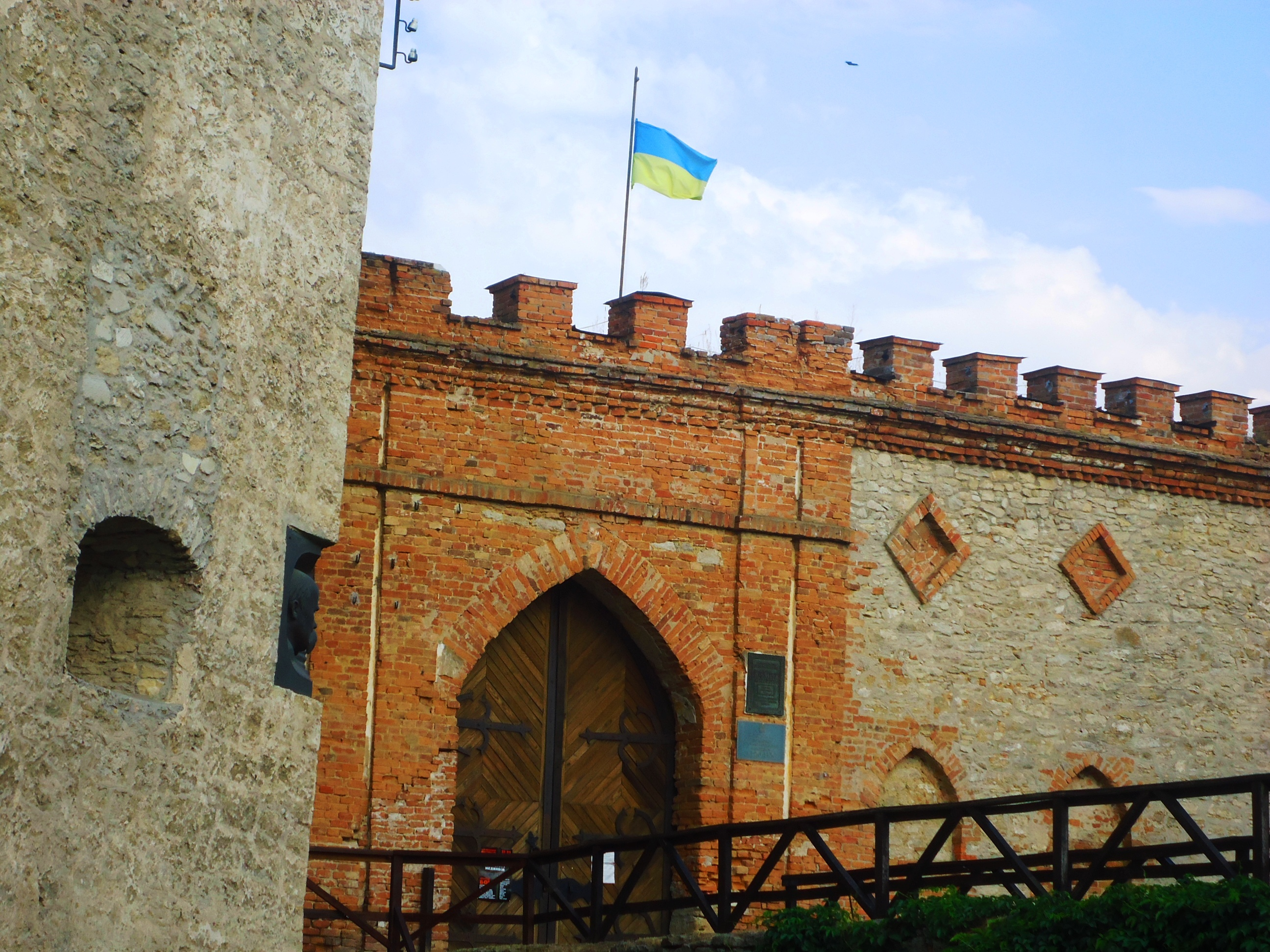 Замок (мур.), смт Меджибіж, вул. Жовтнева, 1